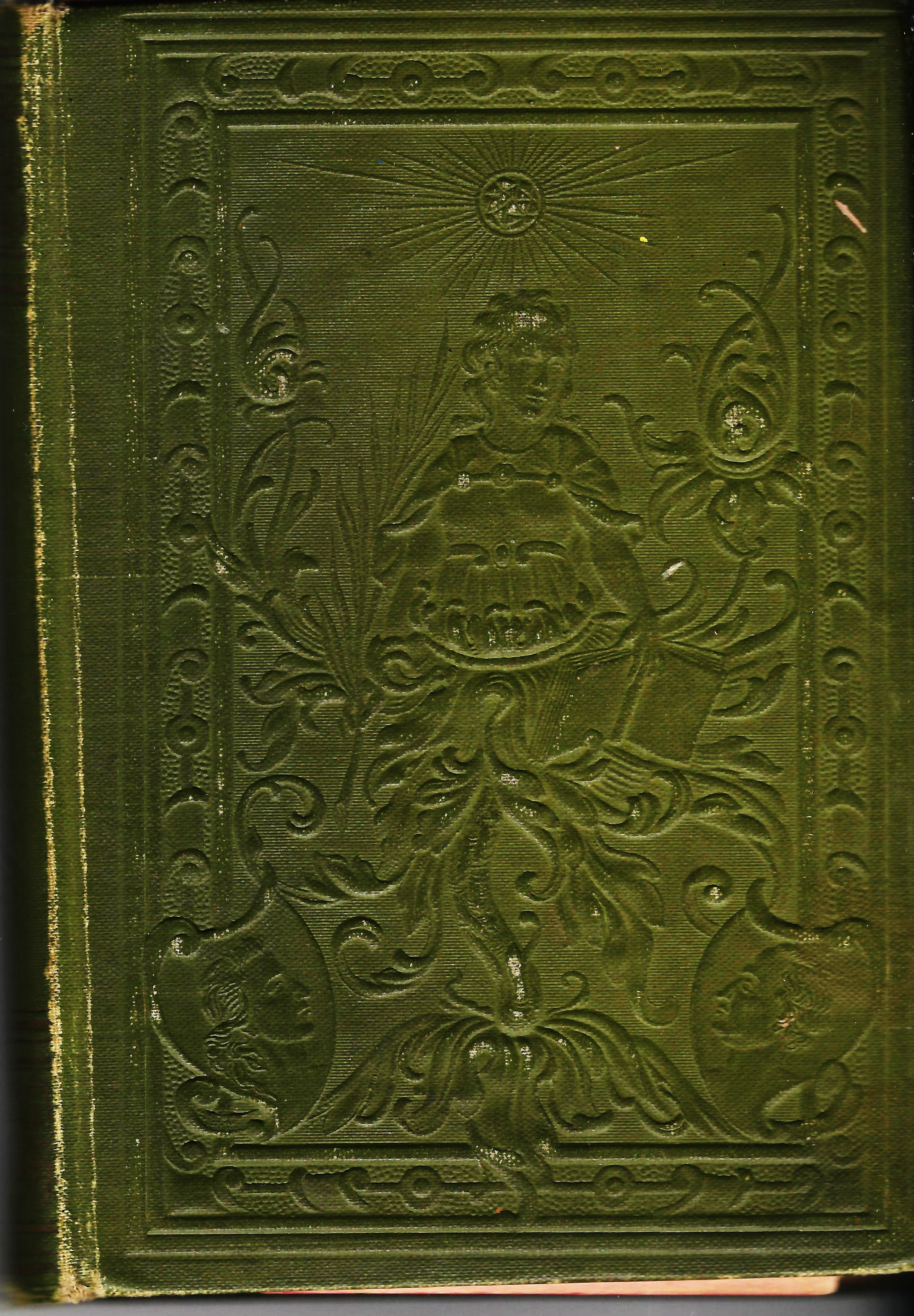 Hardcover der Ausgabe von "Das Buch der Lieder" von 1839